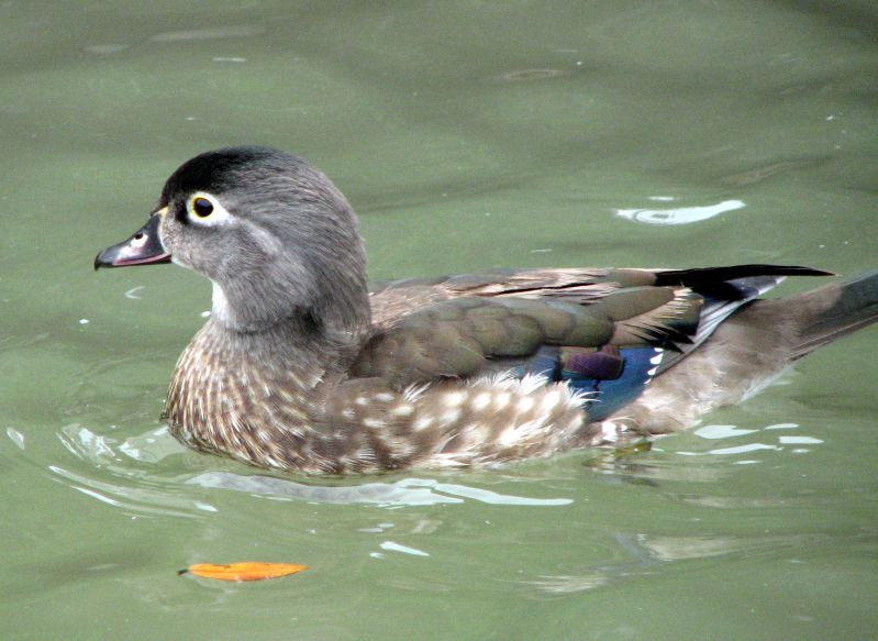 Aix sponsa, female